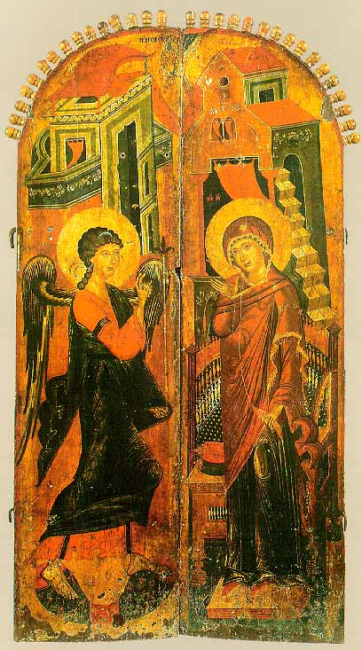 Композицијата Благовештение од XV век. Димензии 119 x 62 cm. Темпера. Гипсен грунд на штица. Од црквата „Св. Богородица“ во с. Ботун, Охридско. Денес во галеријата на икони, Охрид.